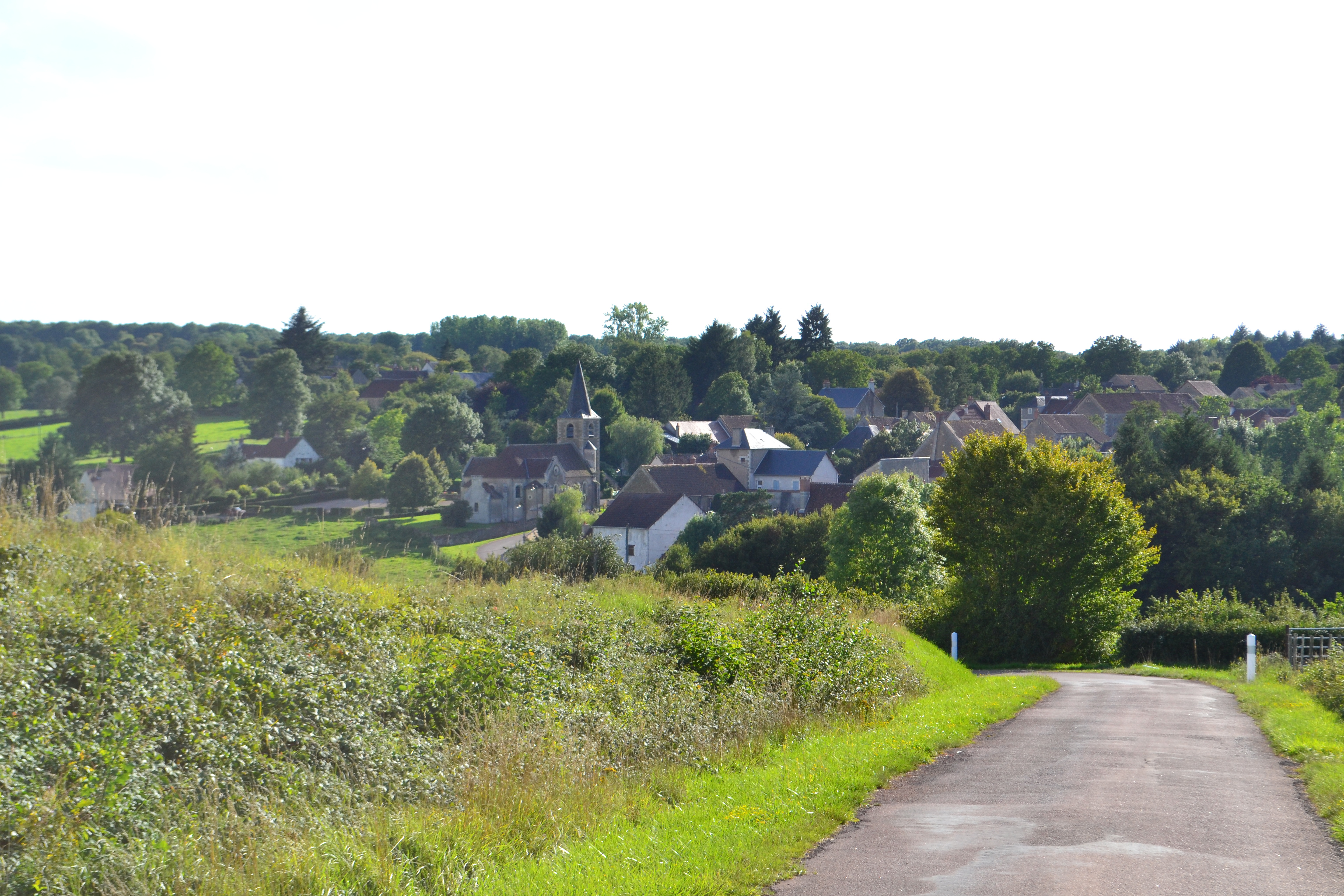 Saint-Bonnot : vue d'ensemble